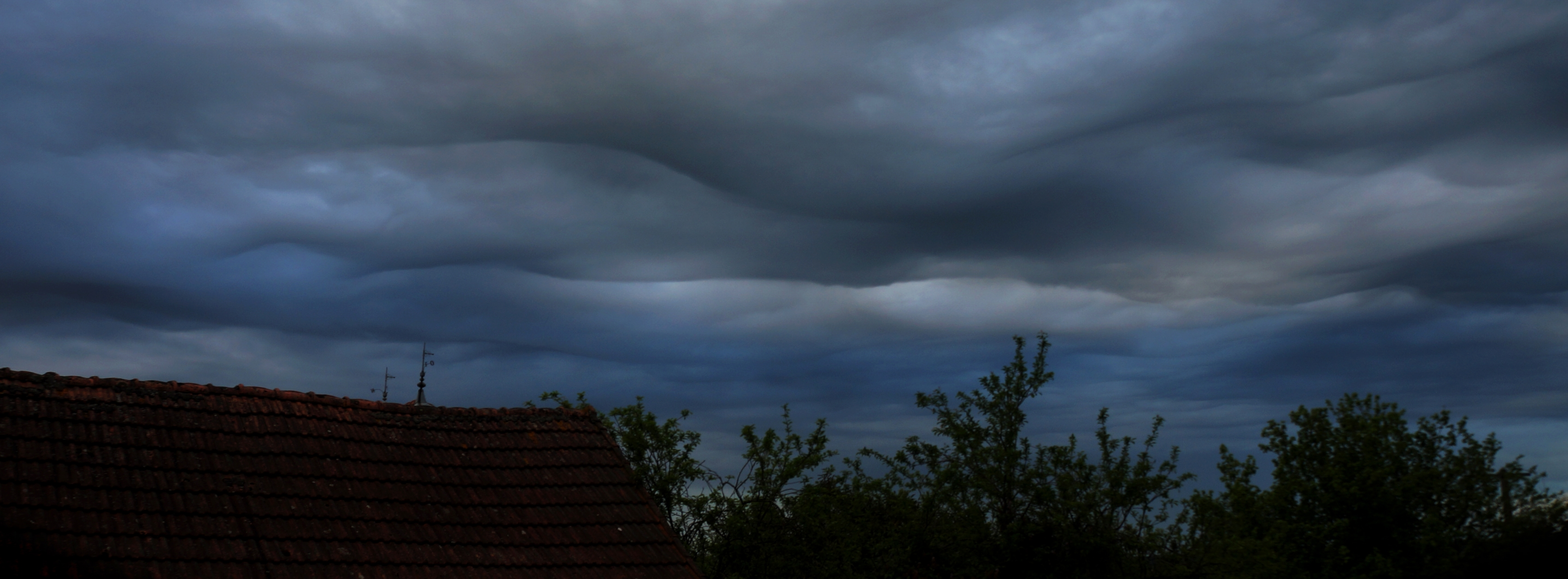 Dans la matinée du 6 mai 2015, vers 7H35, des nuages aux allures mystérieuses caractérisées par des ondulations fascinantes déferlent dans le ciel de l'Allier. Ces formations nuageuses nommées "Asperitas" paraissent menaçantes, mais apportent rarement des précipitations. Ce phénomène rarissime se produit surtout dans les contrées anglo-saxonnes (États-Unis, Nouvelle-Zélande, Royaume-Unis) mais aussi en France. Les conditions de formation de ce ce type de nuage demeurent pour le moment inconnues. Est-ce un nuage particulier ou non ? Cette question divise les scientifiques de l' Organisation météorologique mondiale. Certains pensent que ce type de nuage rarissime (observé pour la première fois dans les années 50) devrait être intégré dans l' Atlas International des Nuages.